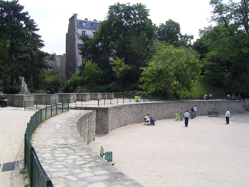 Arènes de Lutèce Photo personnelle (own work) de Marianna